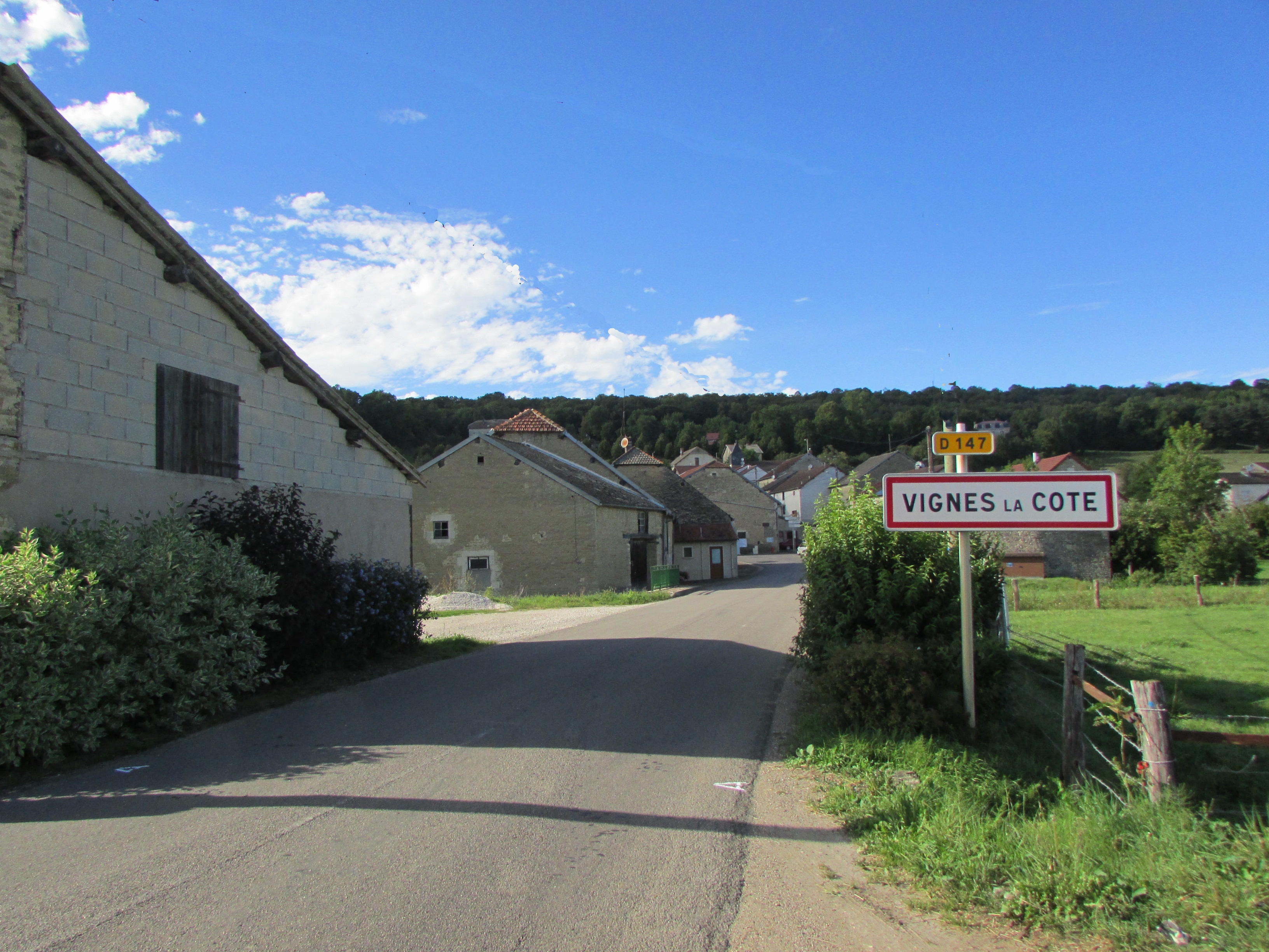 Entrée du village